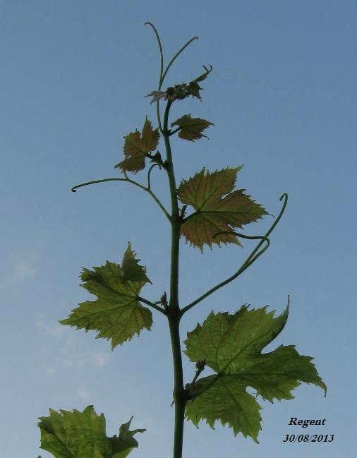 Koronka winorośli odmiany regent